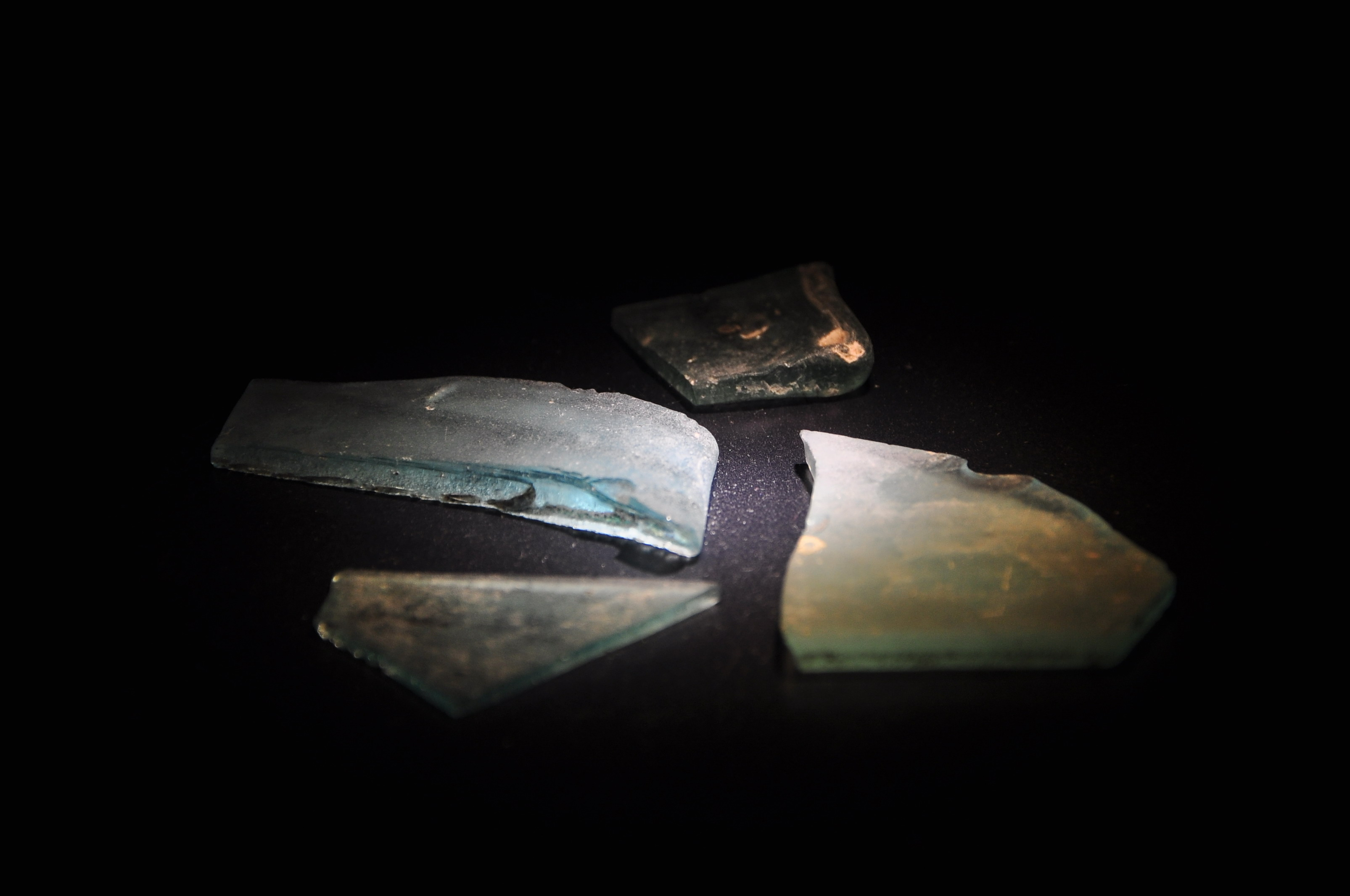 Exponat aus der Thermengasse im einstigen römischen vicus Turicum (Zürich) : Reste von Fensterglass, die ebenfalls dem Bad I zugeordnet werden können. (gemäss Beschriftung in der Vitrine)